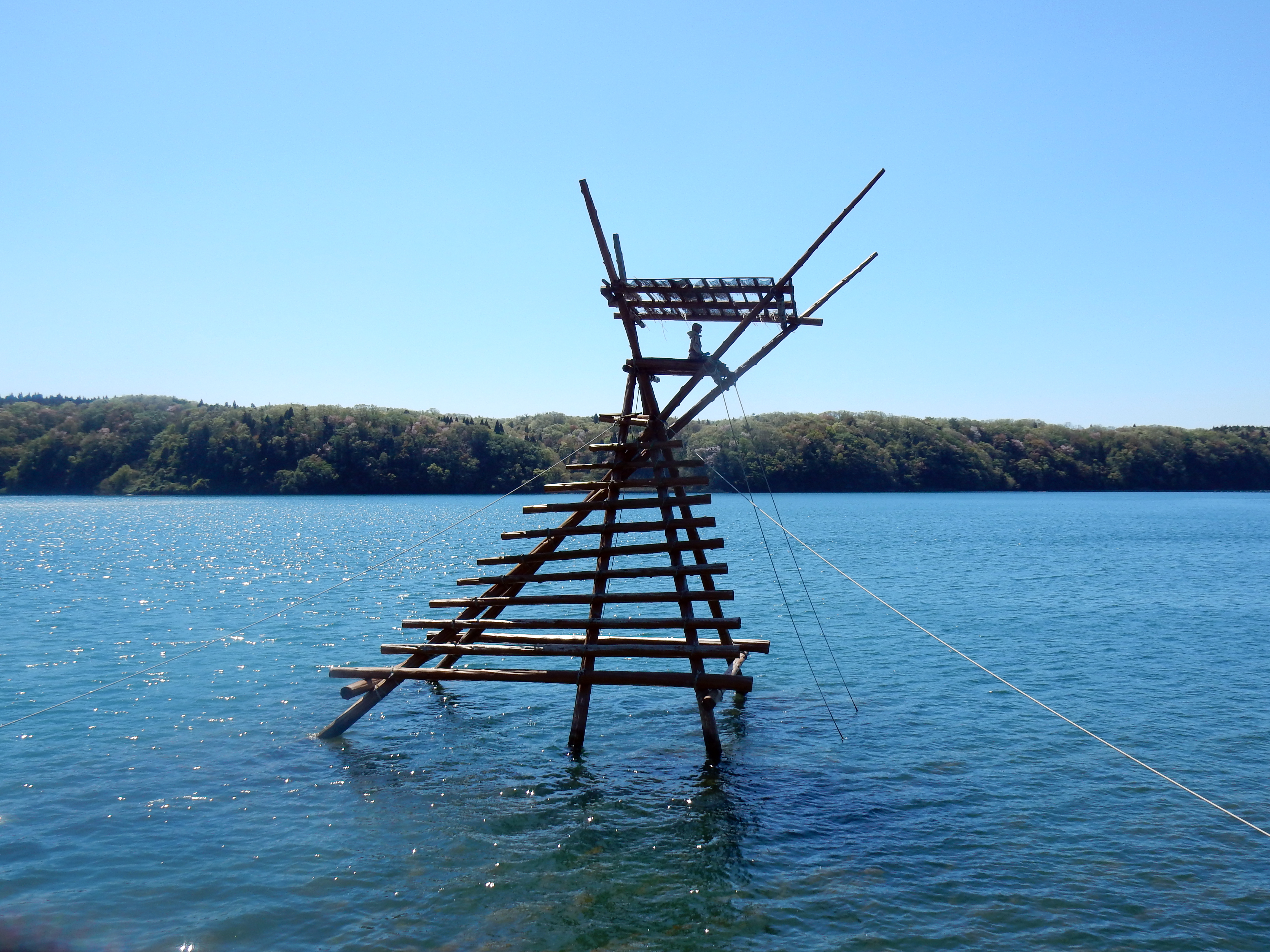 能登のボラ待ち櫓